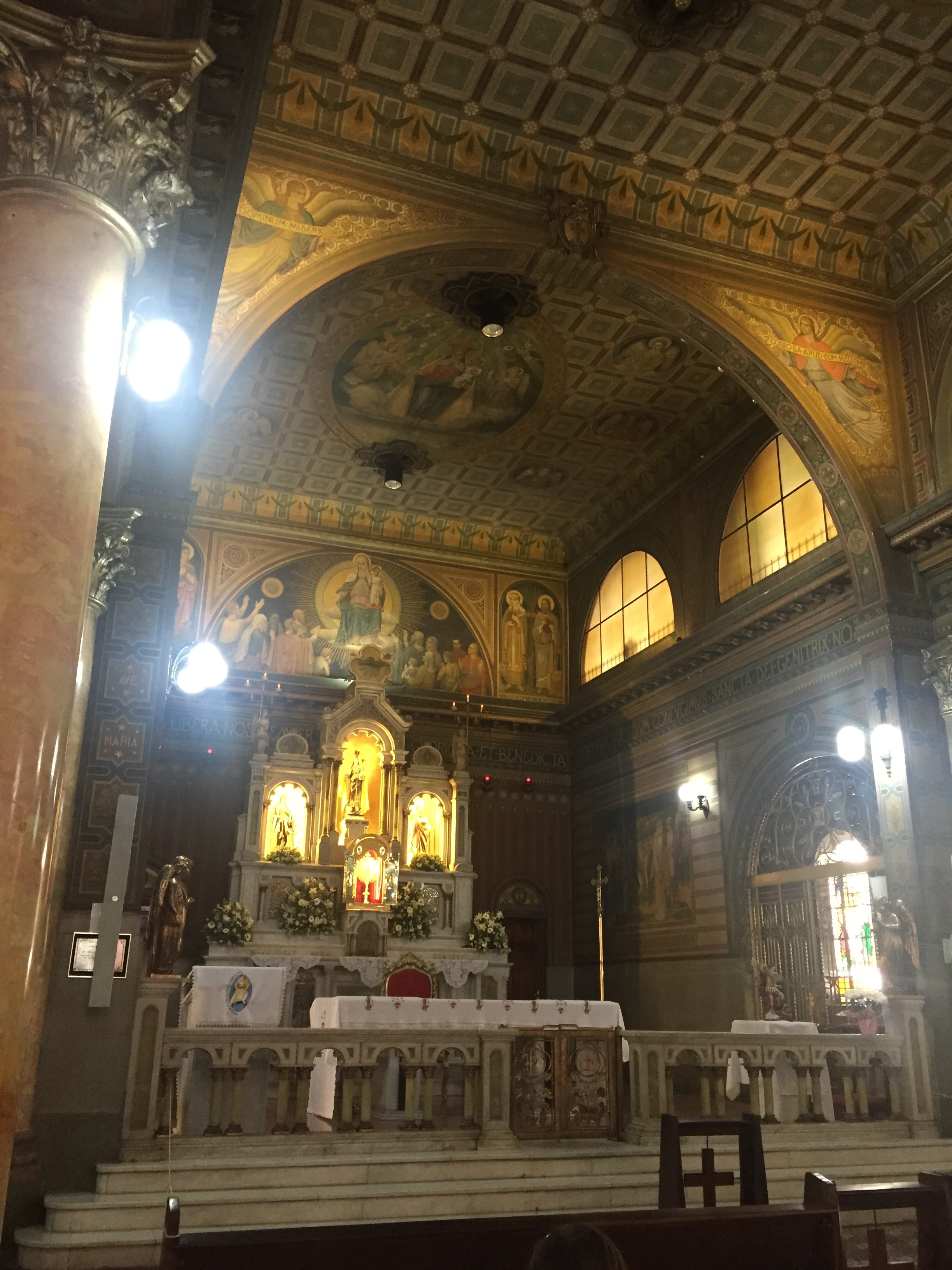 Altar da Igreja Matriz de Nossa Senhora da Penha de França, em São Paulo (SP), Brasil